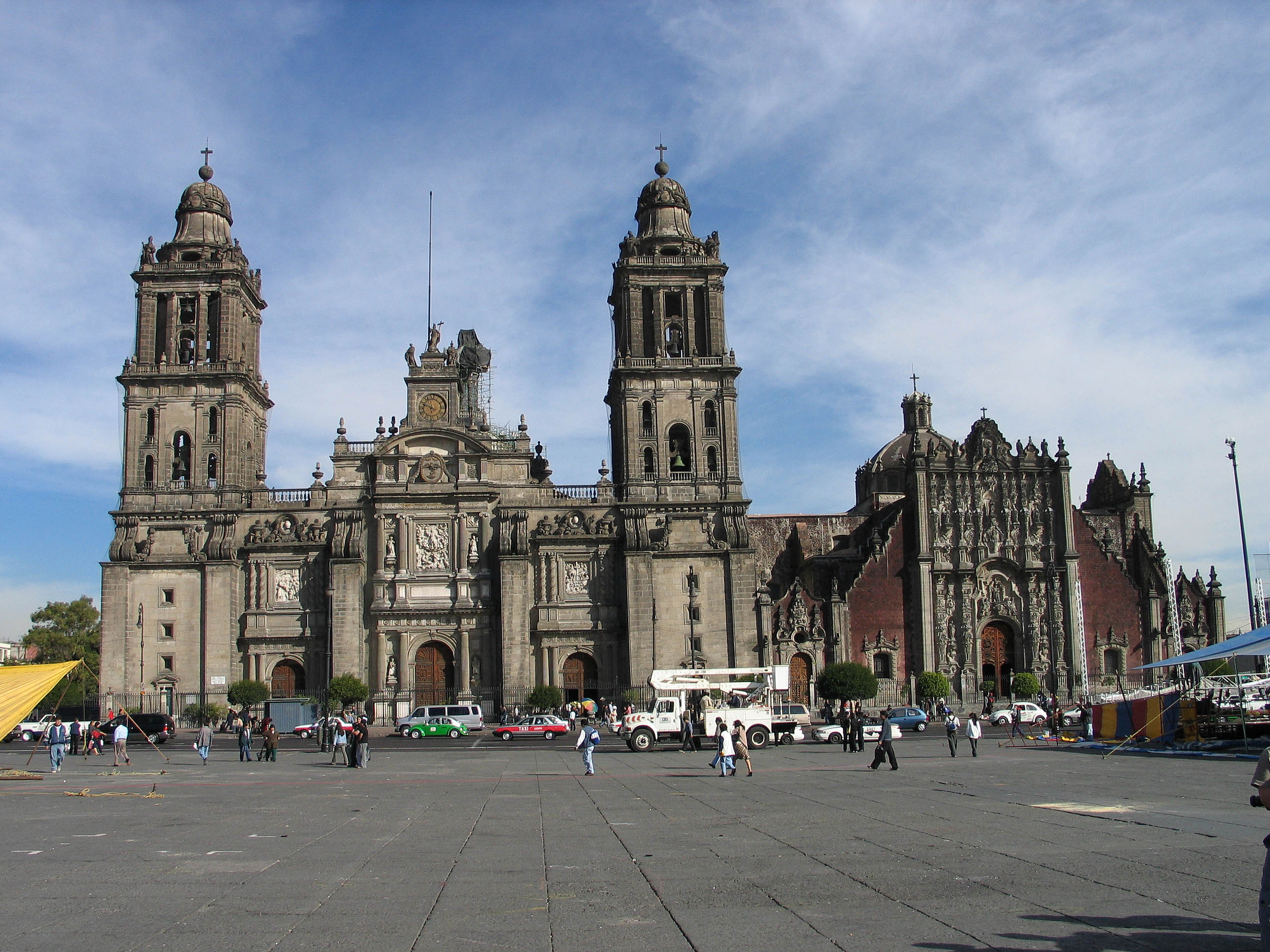 Kathedrale von Mexiko City